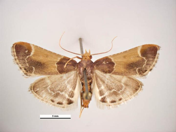 Pyralis farinalis, dorsal view